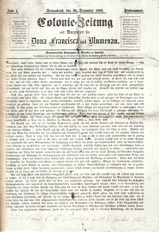 Imagem escaneada do primeiro número do Kolonie Zeitung, ainda com "C"